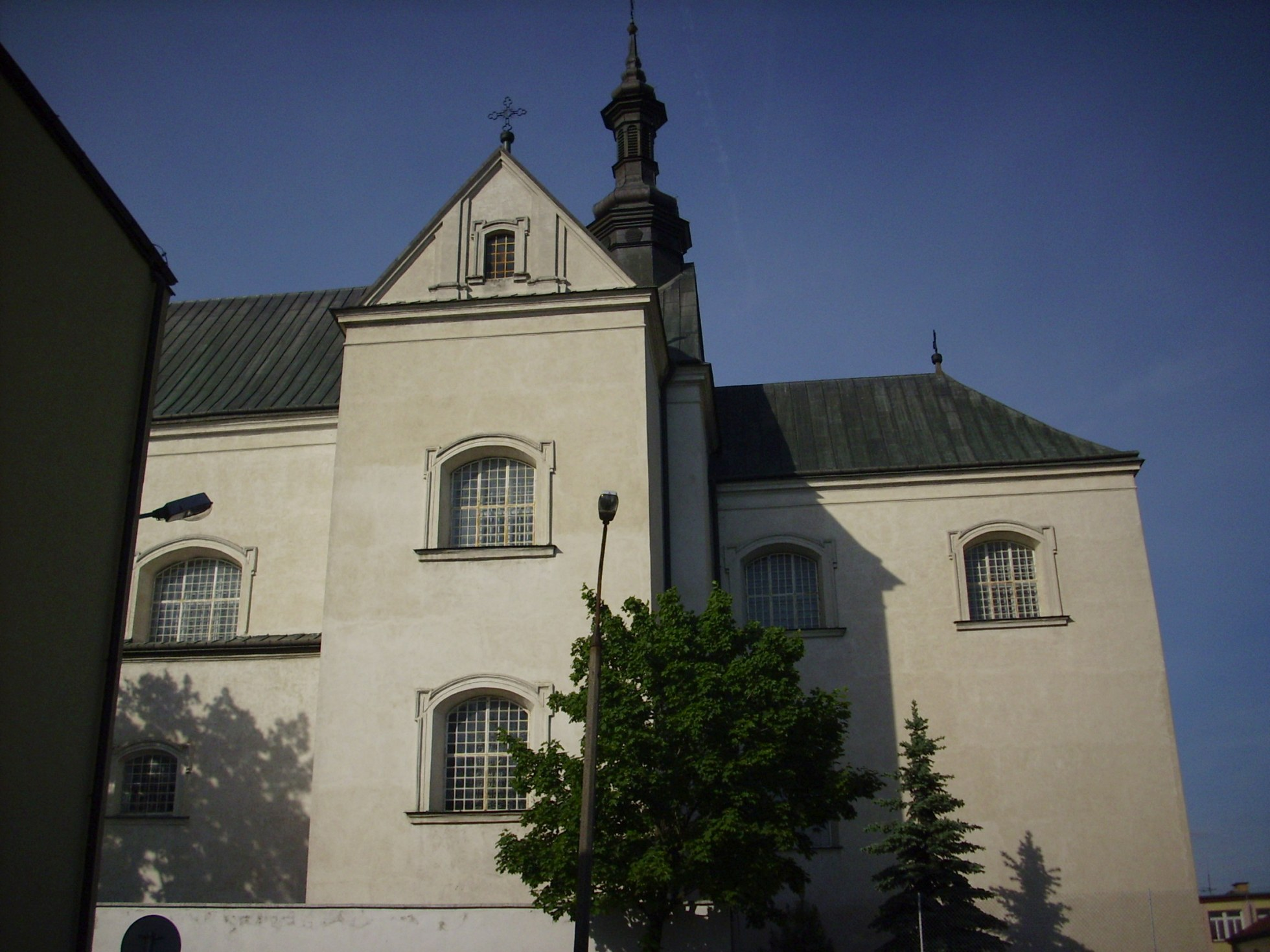 Biała Podlaska. Kościół pw. św. Antoniego. Widok od strony zachodniej.